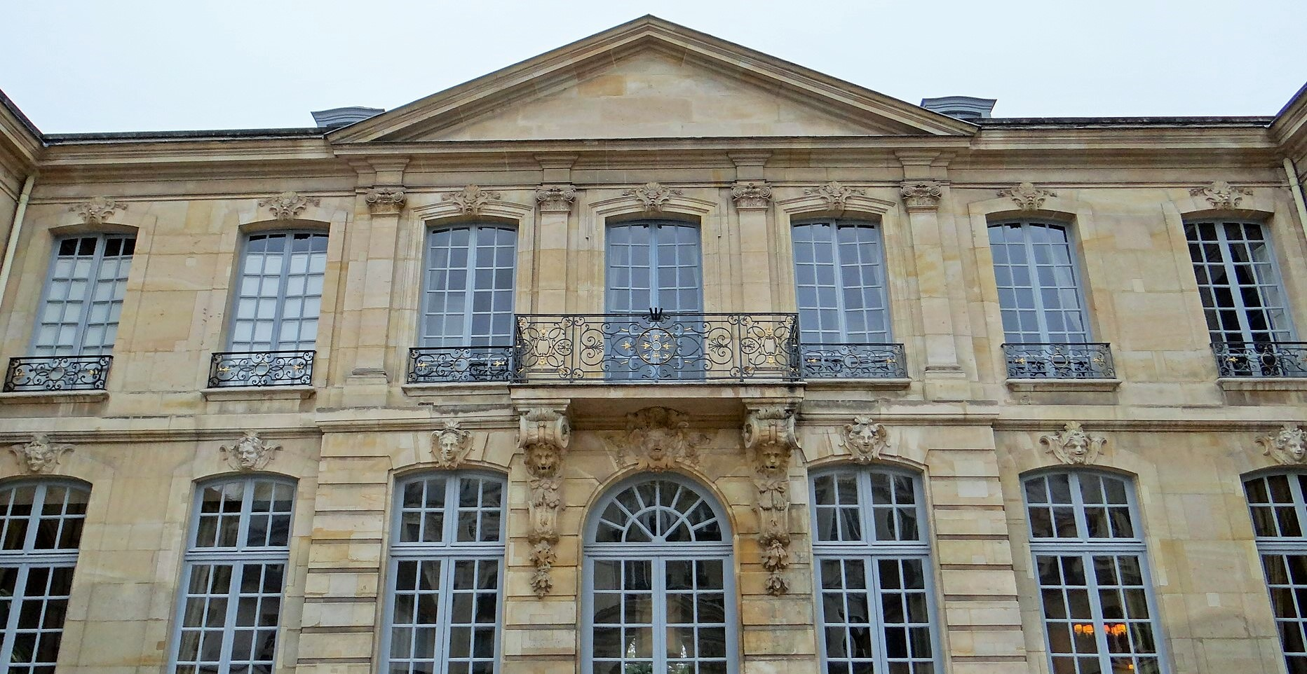 Façade coté cour Façade coté cour de de l'Hôtel de Noirmoutier, Paris .